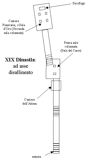 autore: Hotepibre (Giuseppe); tipologia: disegno; località e data: - - ; soggetto: schema planimetrico di tomba, ad asse disallineato, della XIX Dinastia della Valle dei Re; prodotto utilizzato per la realizzazione: Power Point.